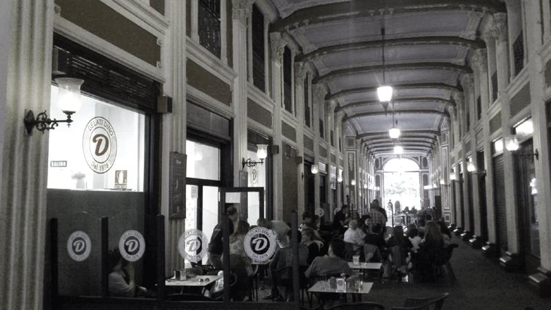 Pasaje construido en Zaragoza a finales del siglo XIX